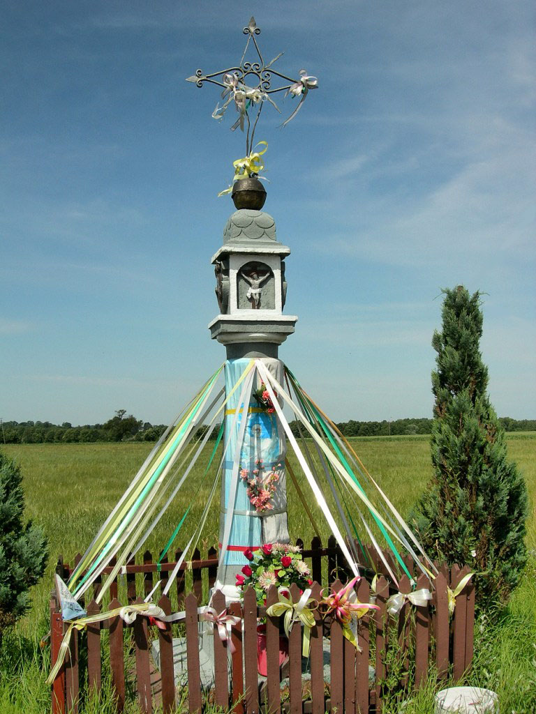 XVII-wieczna kolumna w Gzowicach-Folwarku